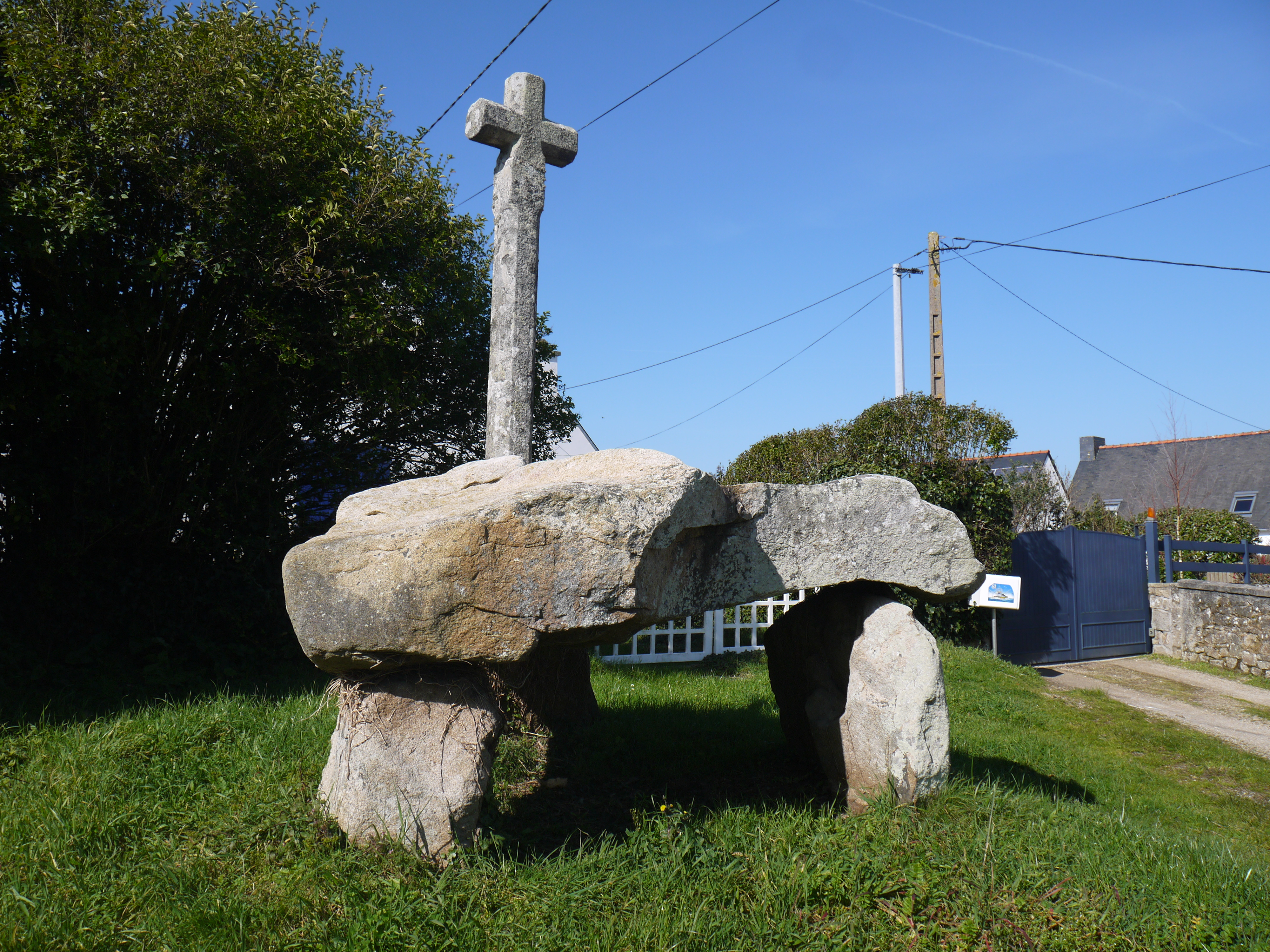 Un dolmen christianisé